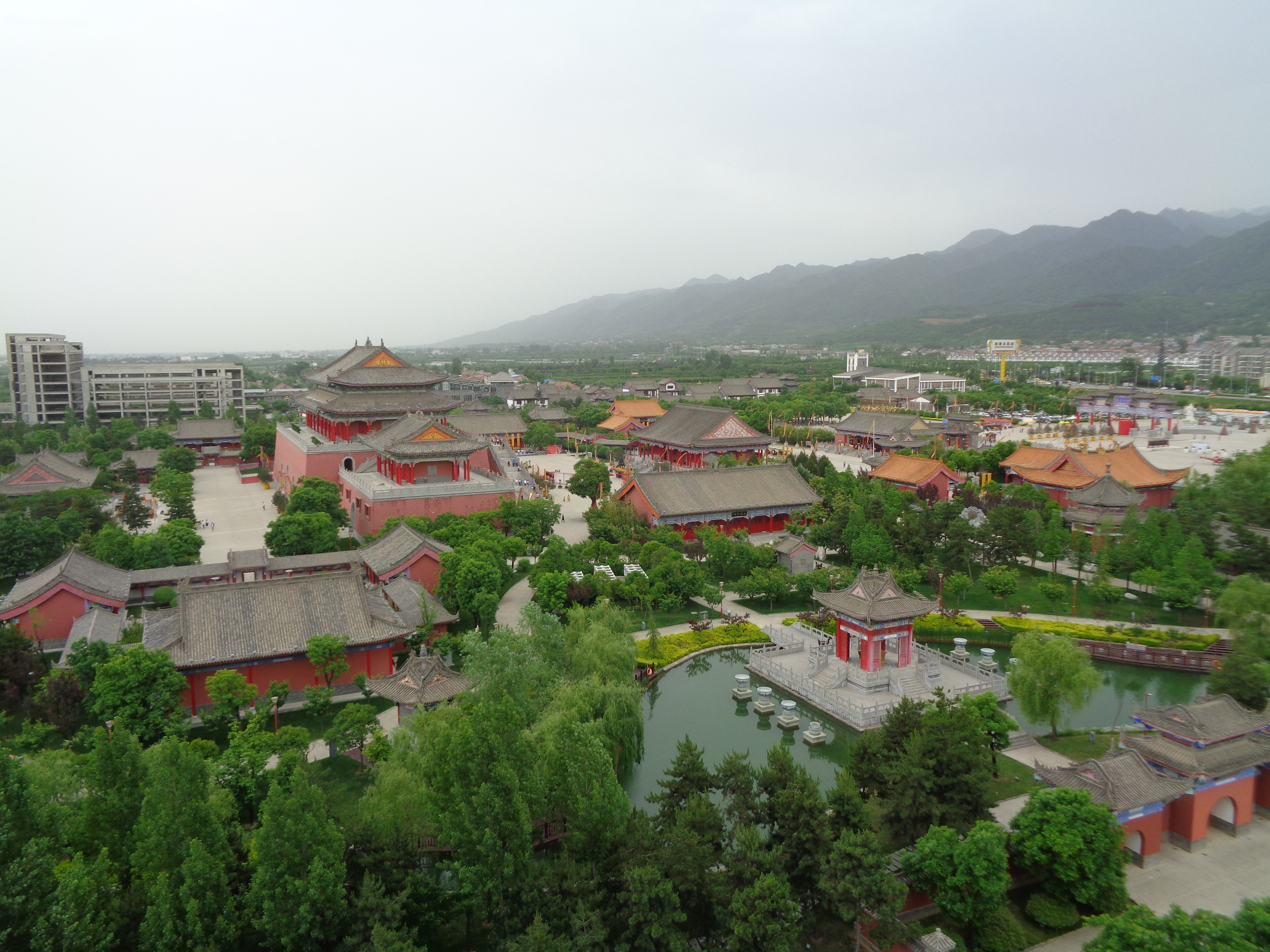 西安市周至县107省道 近郊楼观台